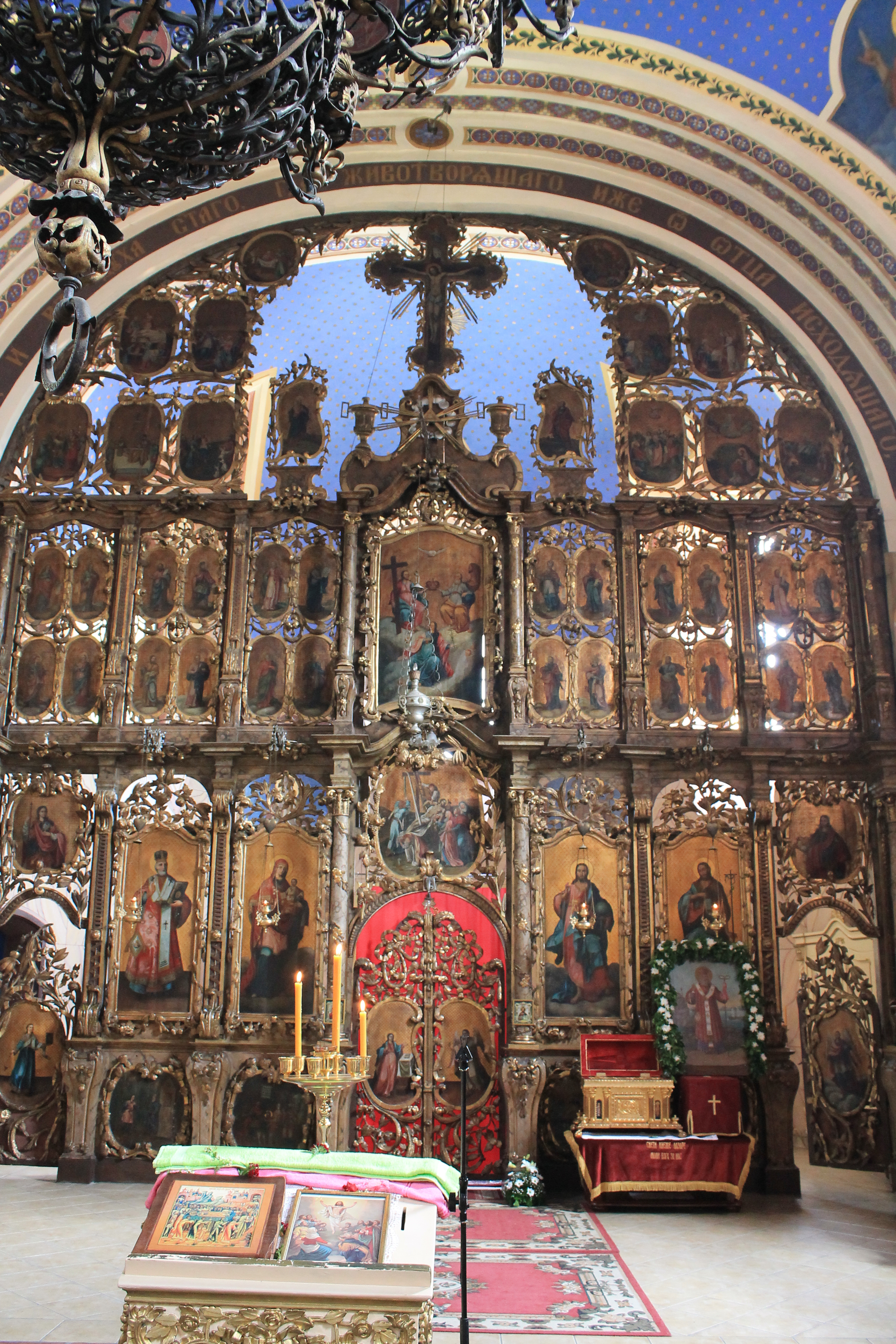 Crkva Sv. Nikole (Šid)